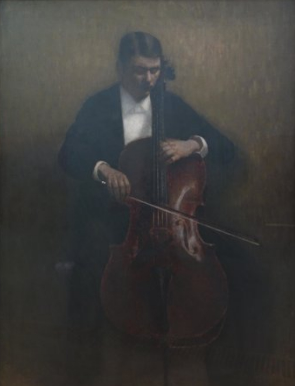 Виолончелист. Портрет Хенри Брамсена